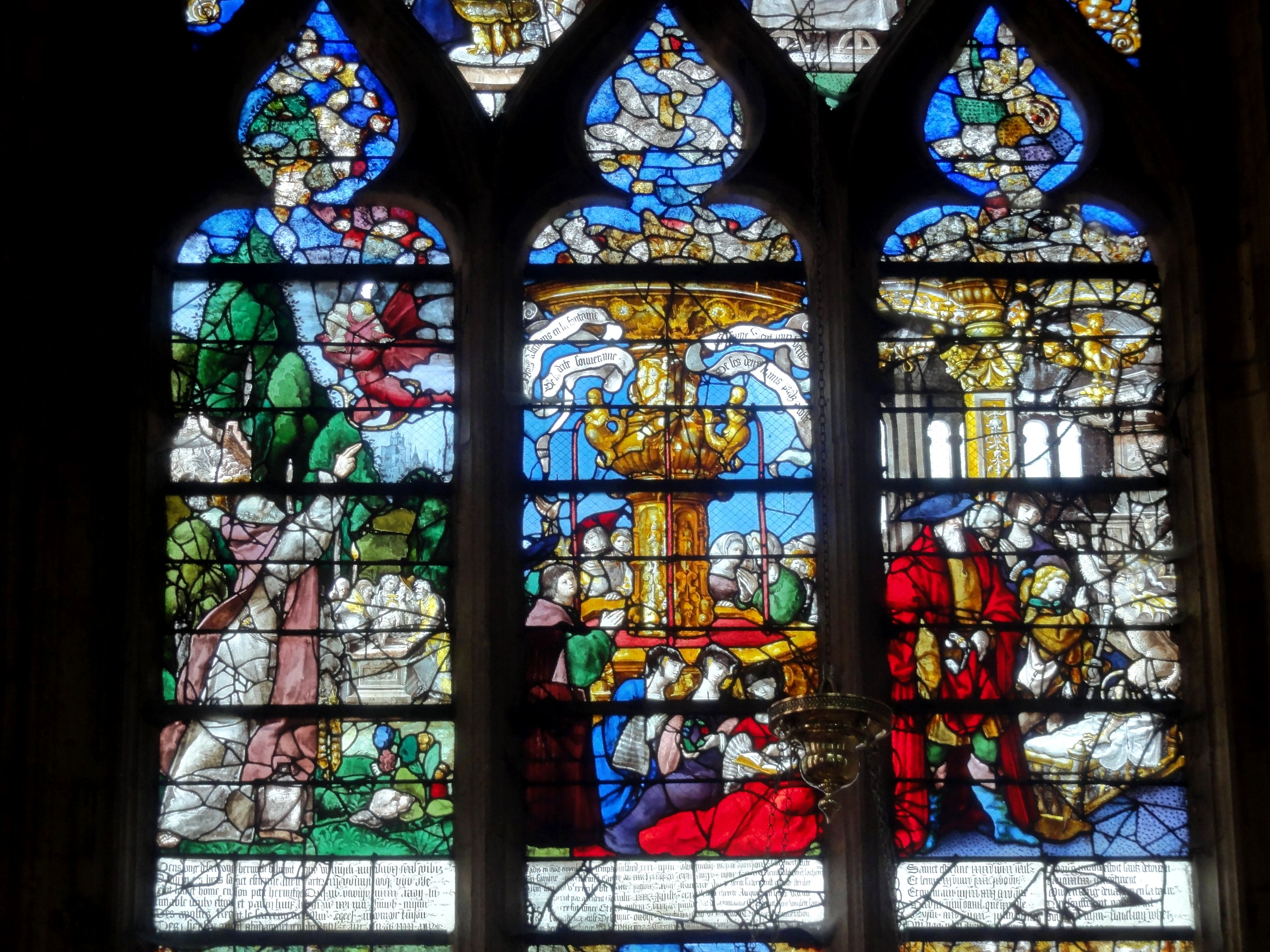 Vitrail de la baie n° 12 dans la chapelle Saint-Nicolas : « Fontaine de Vie » et « Enfance de saint Étienne ».